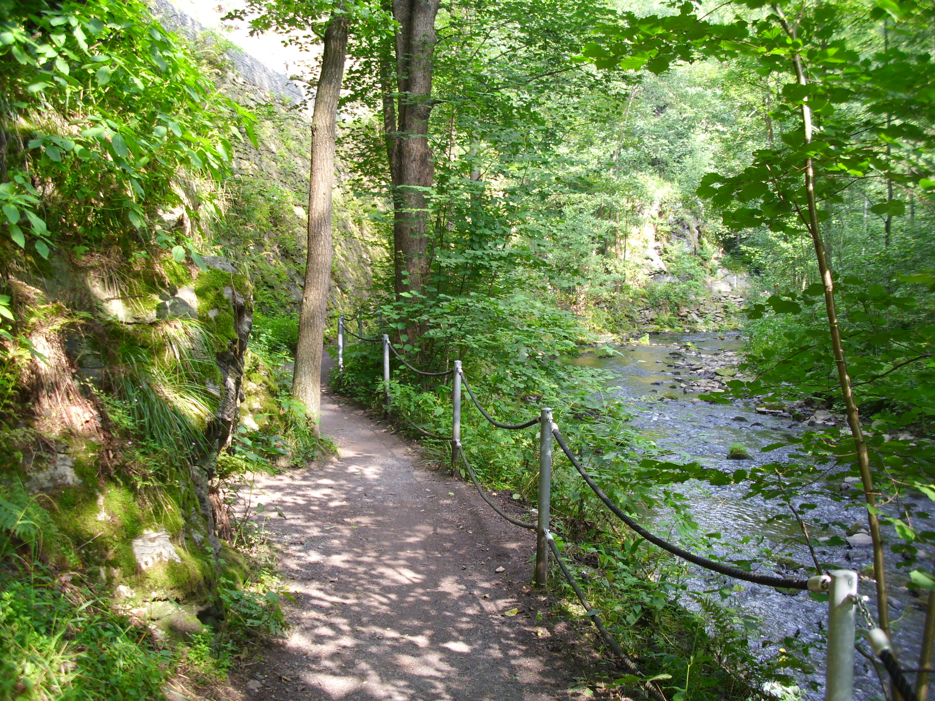 Der Schöne Wanderweg durch den Oberen Rabenauer Grund, hier unertrhalb des Trompeterfelsen im Seifersdorfer Grund.